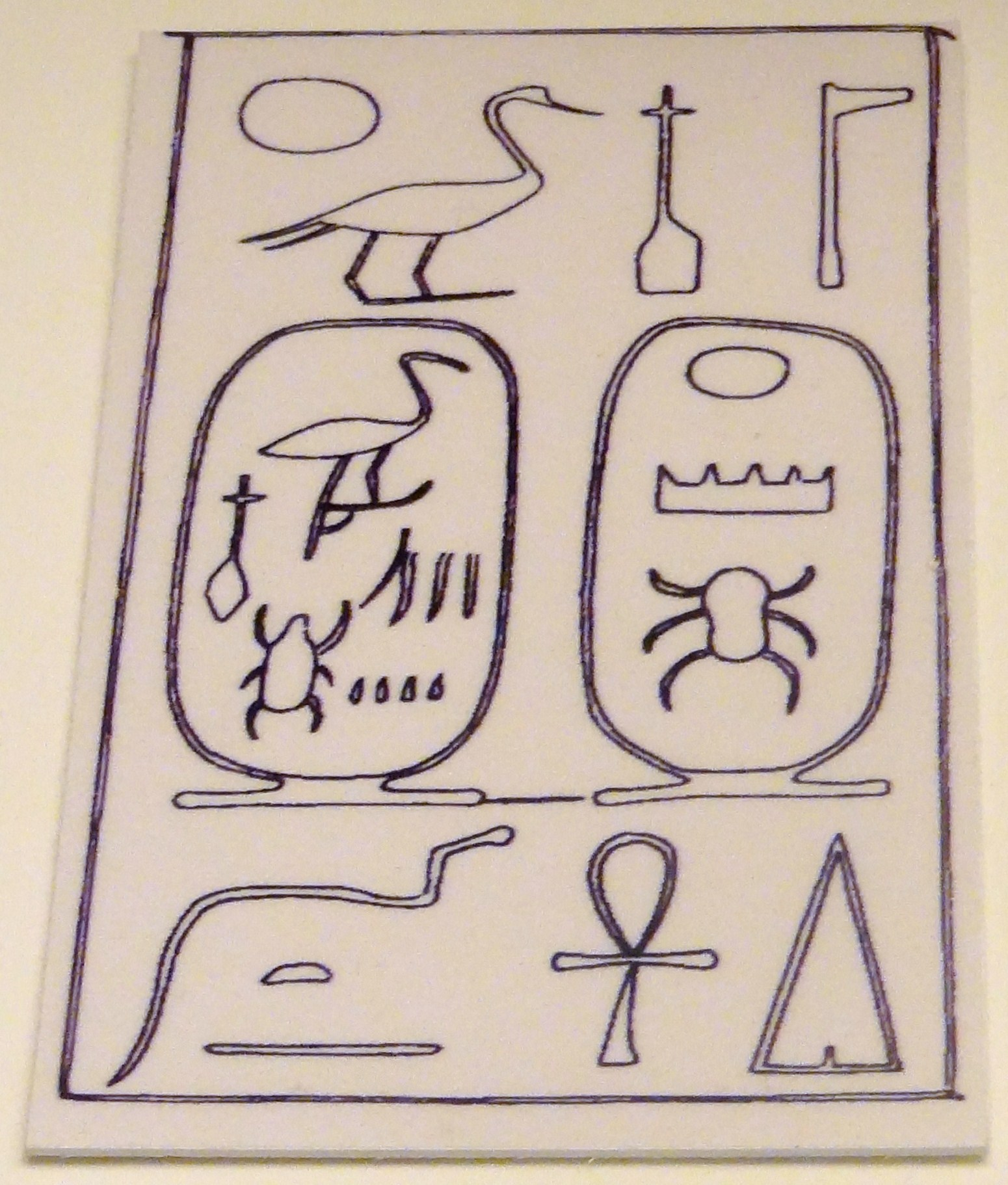 Abzeichnung der eingeschnittenen Hieroglypheninschrift Thutmosis III. (1479/69–1436/25 v. Chr.) auf der importierten ägyptischen Alabasteramphore aus der 18. Dynastie: „Der vollkommene Gott Men-cheper-Re (Bleibend ist die Erscheinung des Re), Sohn des Re Thutmosis nefer-cheperu (Vollkommen an Erscheinungen), dem Leben gegeben ist ewiglich.“ (1400–1350 v. Chr.) aus Katsambas, ausgestellt im Archäologischen Museum Iraklio, Kreta, Griechenland